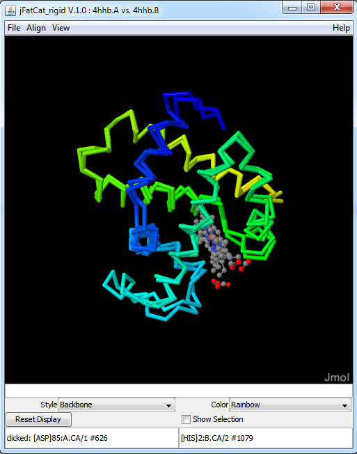 Esta ventana muestra dos proteínas con IDs "4hhb.A" y "4hhb.B" alineados una contra la otra. El código se muestra en el lado izquierdo. Esto se produce utilizando bibliotecas BioJava que a su vez utiliza visor de Jmol. El FATCAT algoritmo rígido que se utiliza aquí para hacer la alineación.